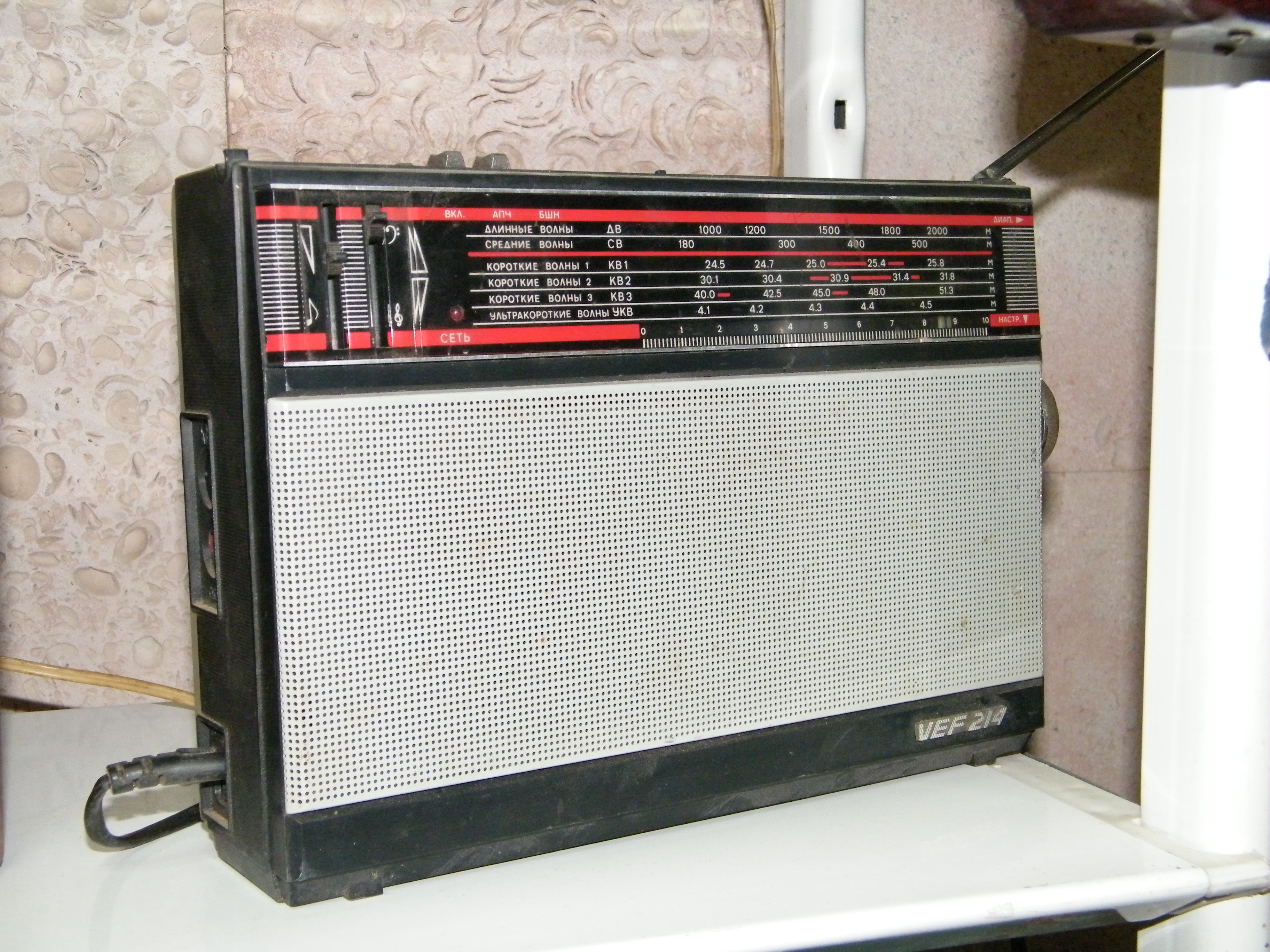 Теплый ламповый звук